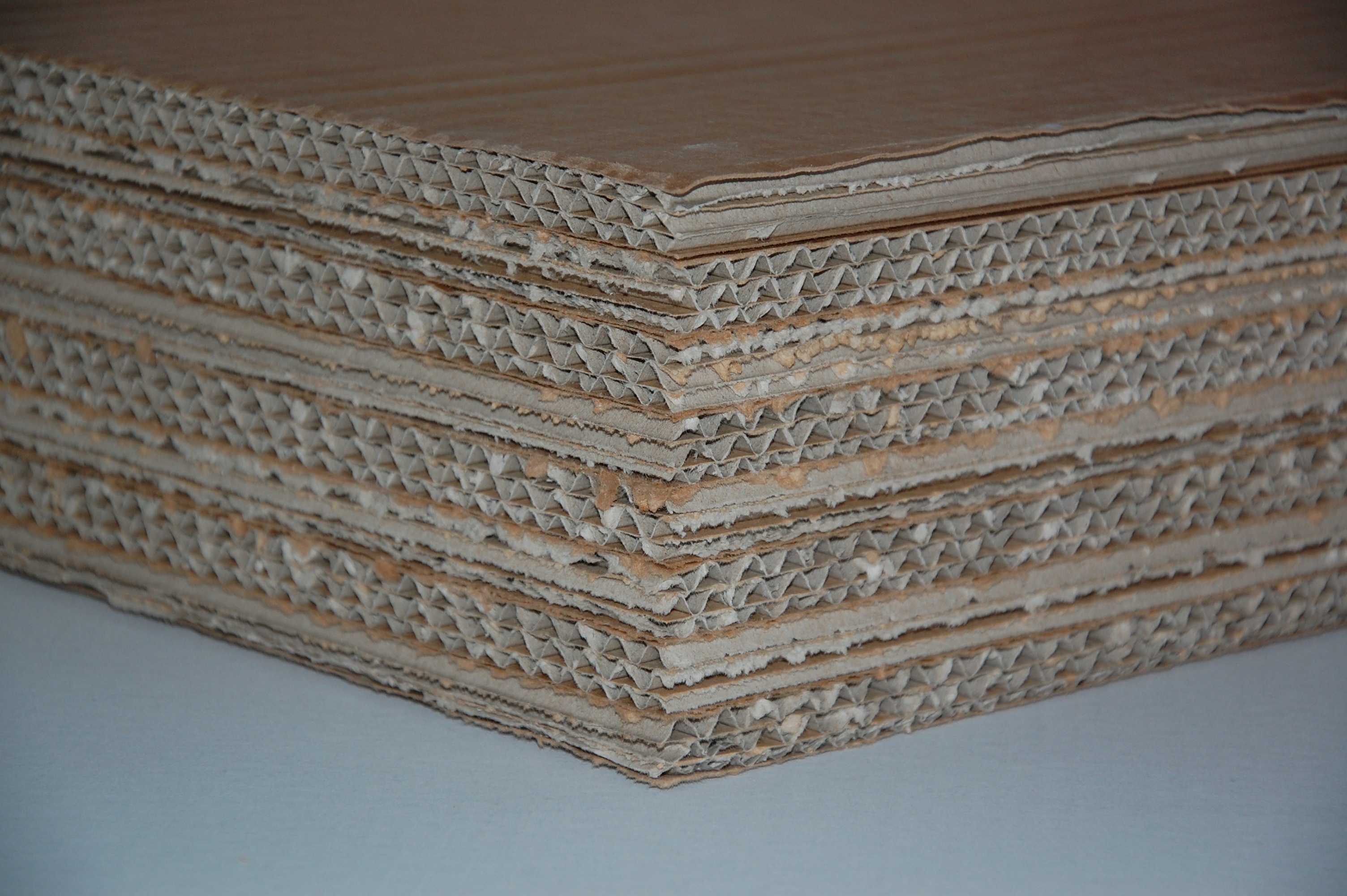 Zellstoffverbundelement, Zellstoff, Dämmung